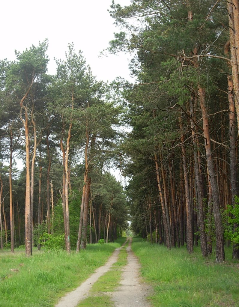 Las Gdański. Droga leśna, którą wiedzie niebieski szlak turystyczny "Brdy"